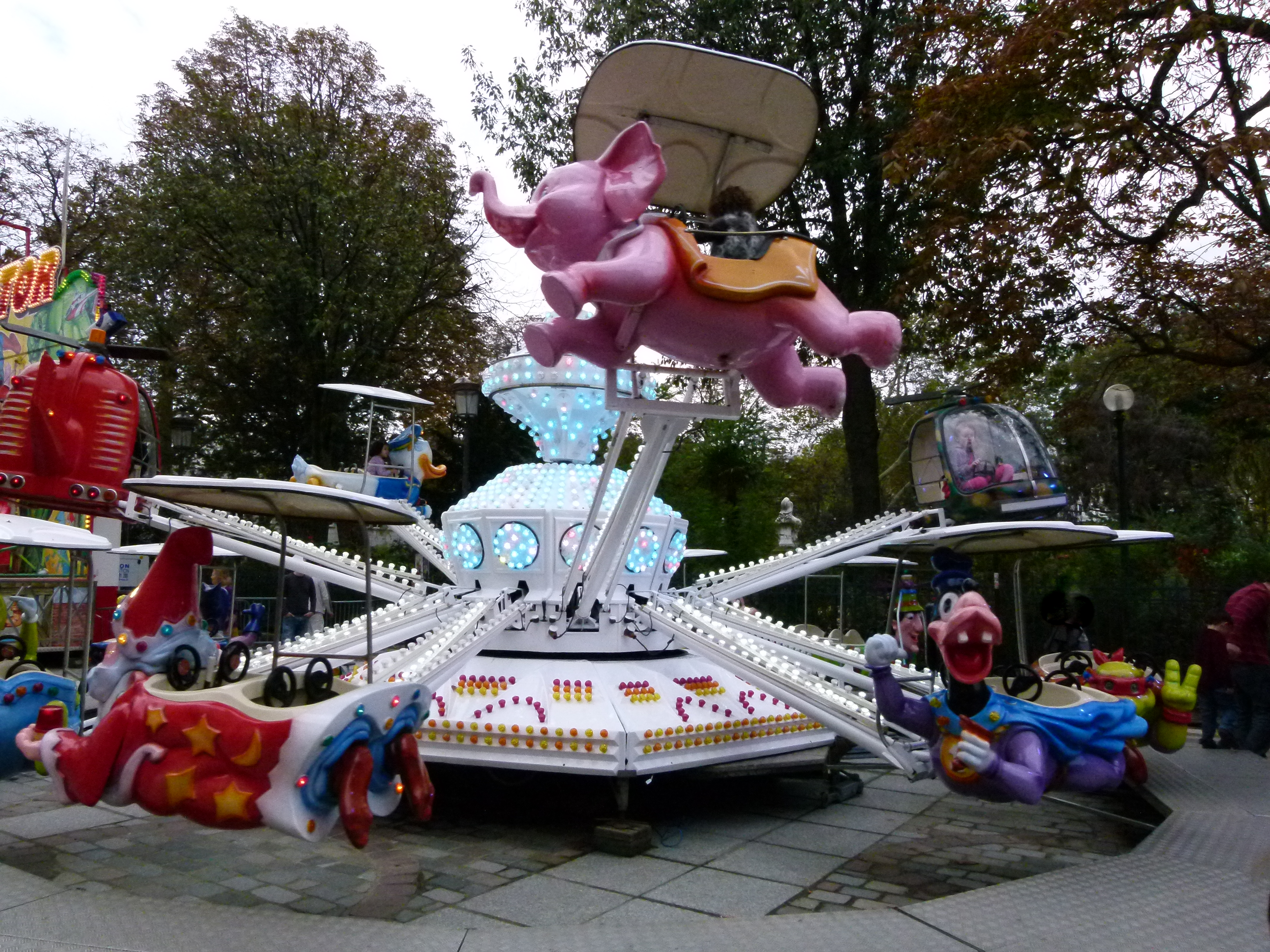 Fête foraine - Le manège volant